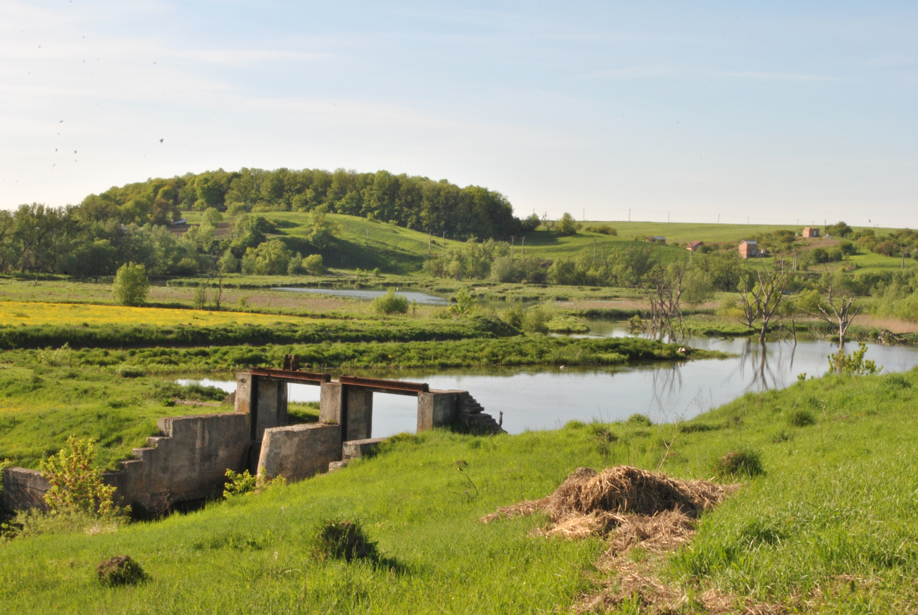 Гідрологічний заказник місцевого значення «На Куті» у водно-болотному масиві заплави р. Гнізни між смт Великі Бірки та с. Дичків Тернопільського району Тернопільської області.